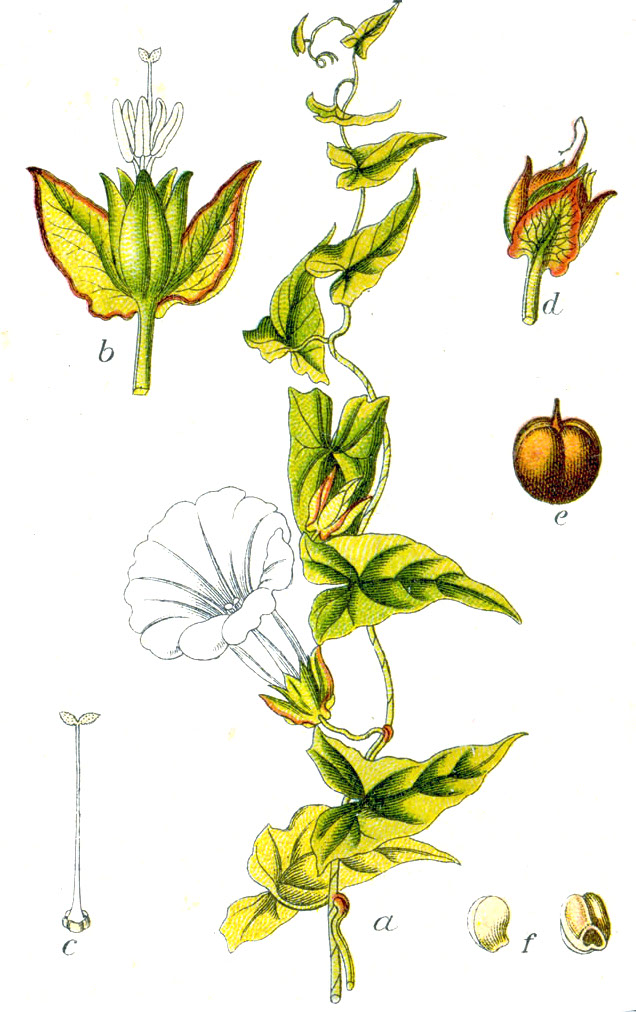 Calystegia sepium subsp. sepium, syn. Convolvulus sepium L. Original Description Zaun-Winde, Convolvulus sepium